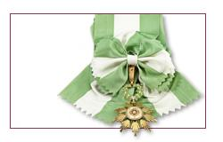 Ordem mérito agricola